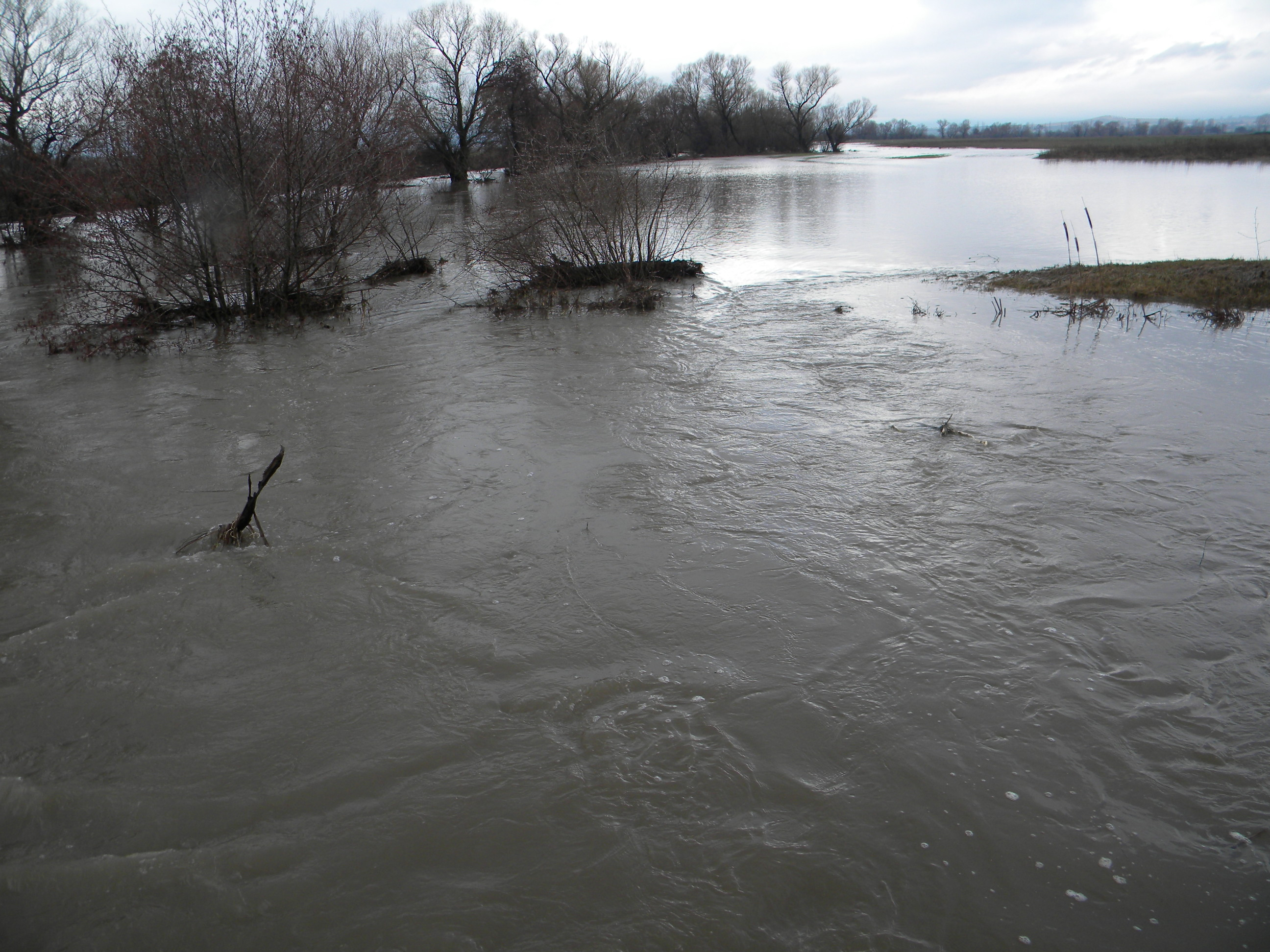 река Блягорница